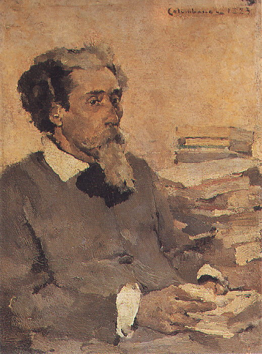 Bulhão Pato